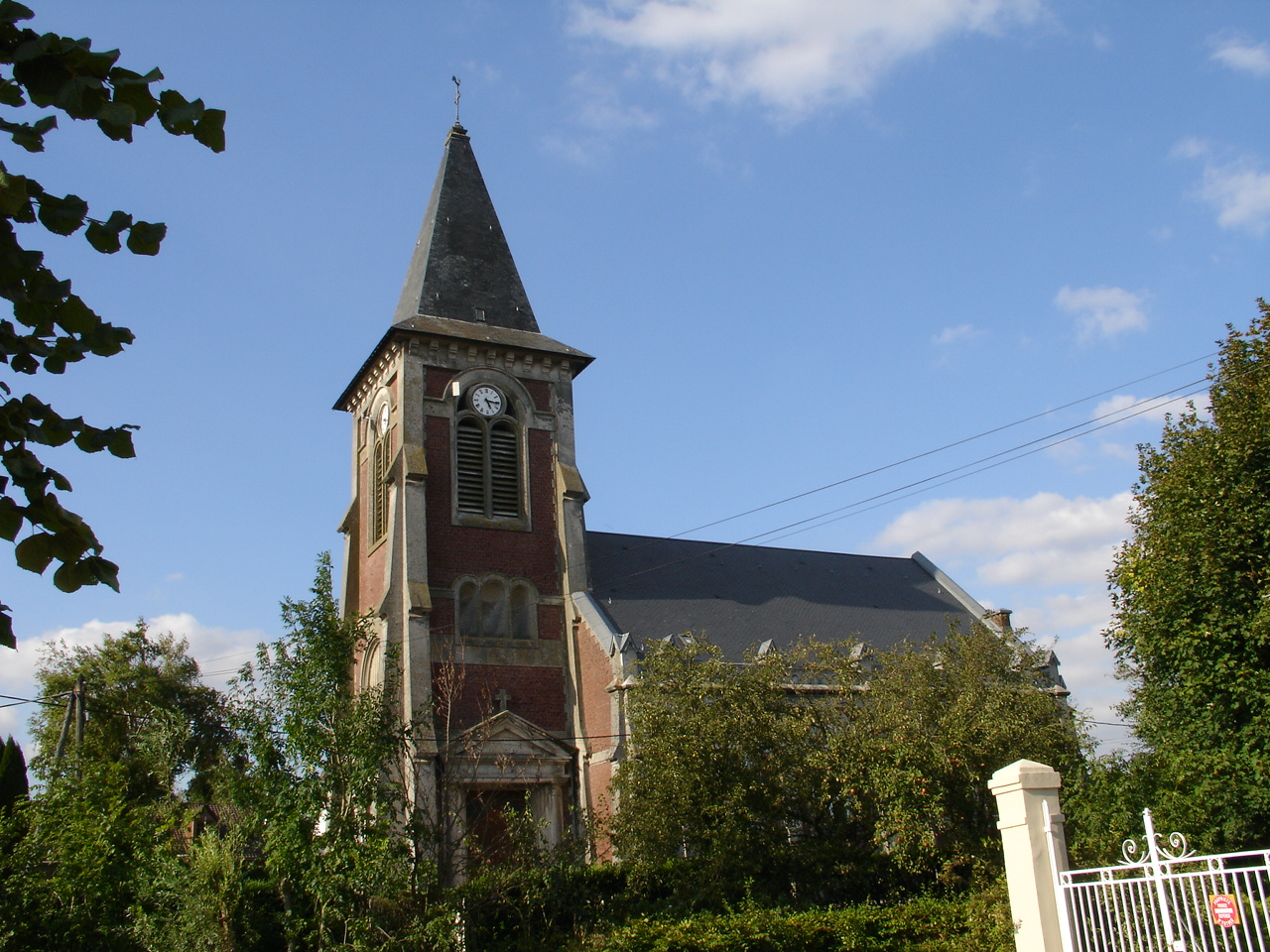 Église de Wailly